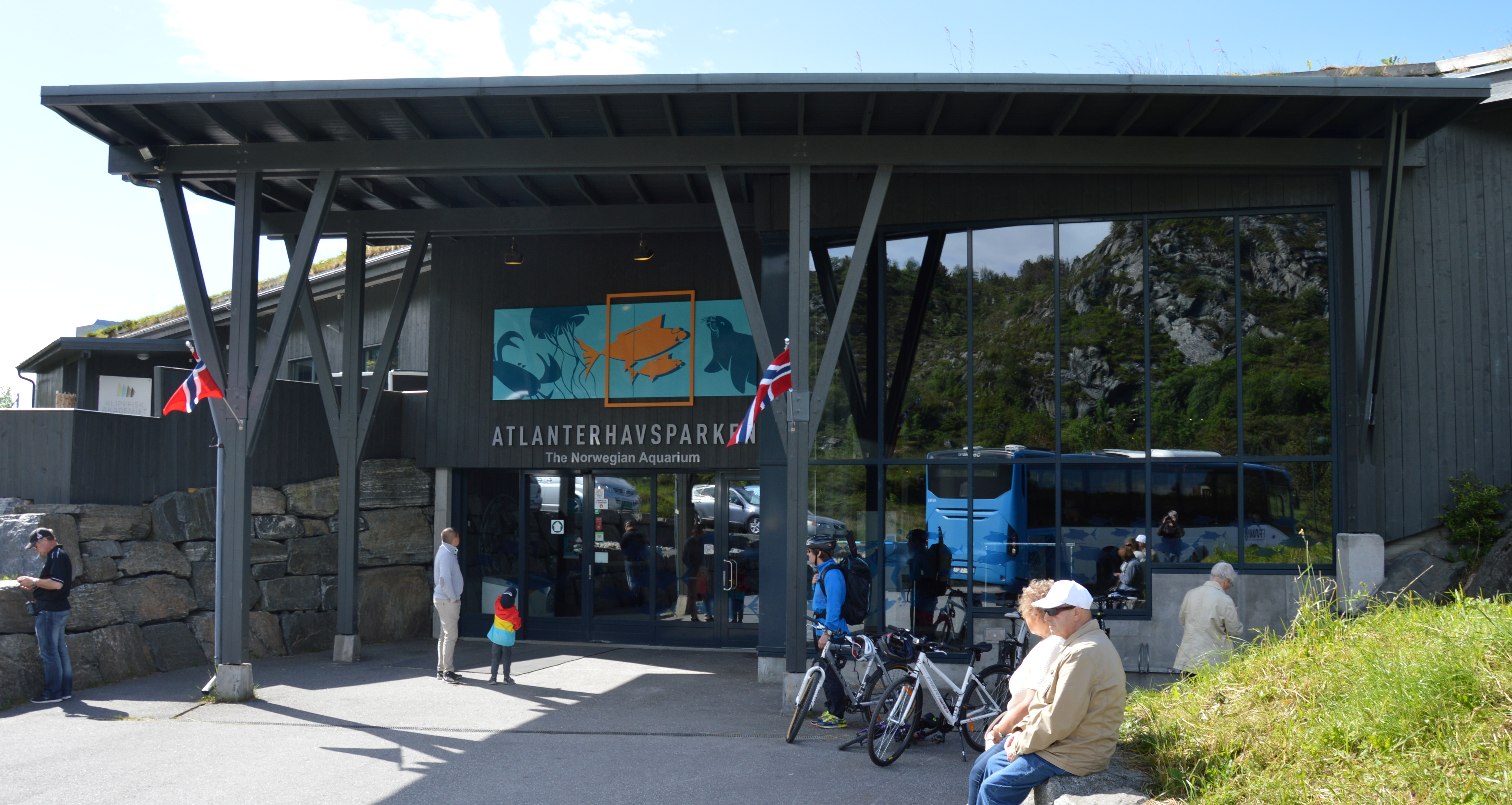 Eingang Atlantikpark Alesund